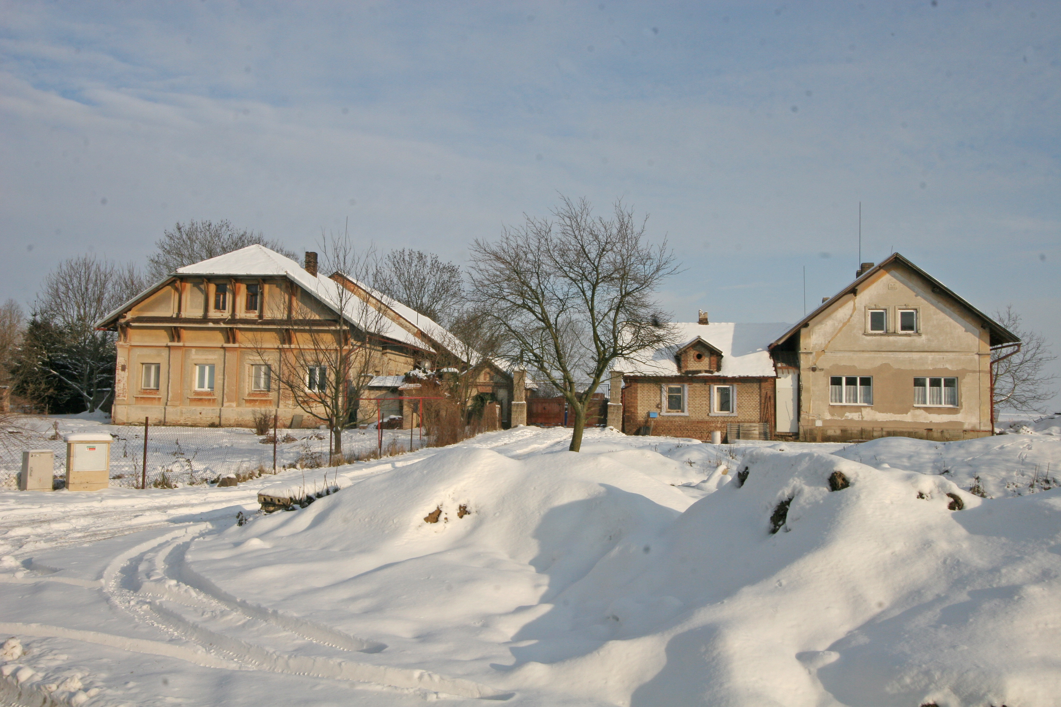 Čeradice čp. 2